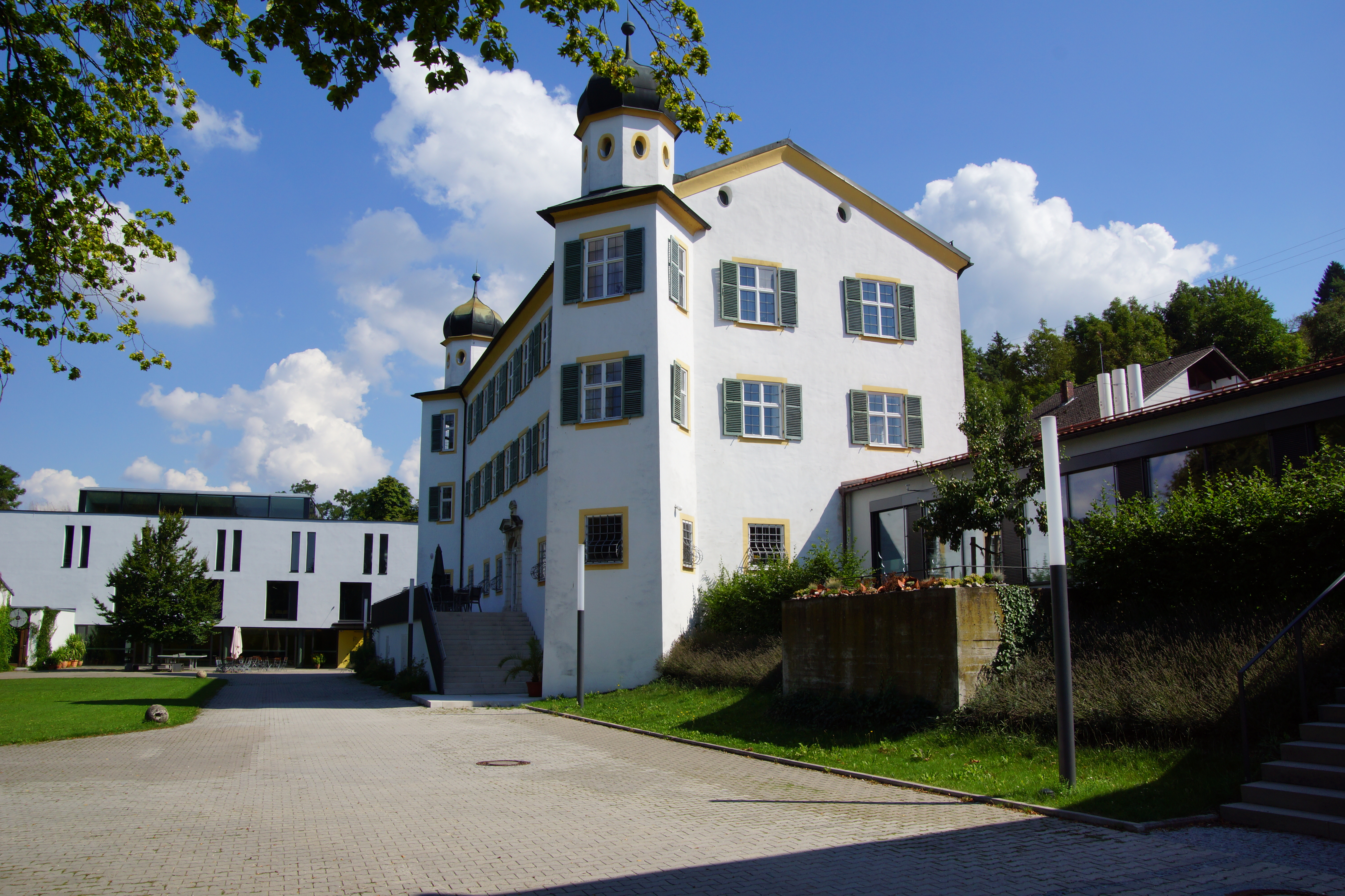 Das ehemalige Schloss wird gegenwärtig als Jugendhaus der Diözese Eichstätt genutzt